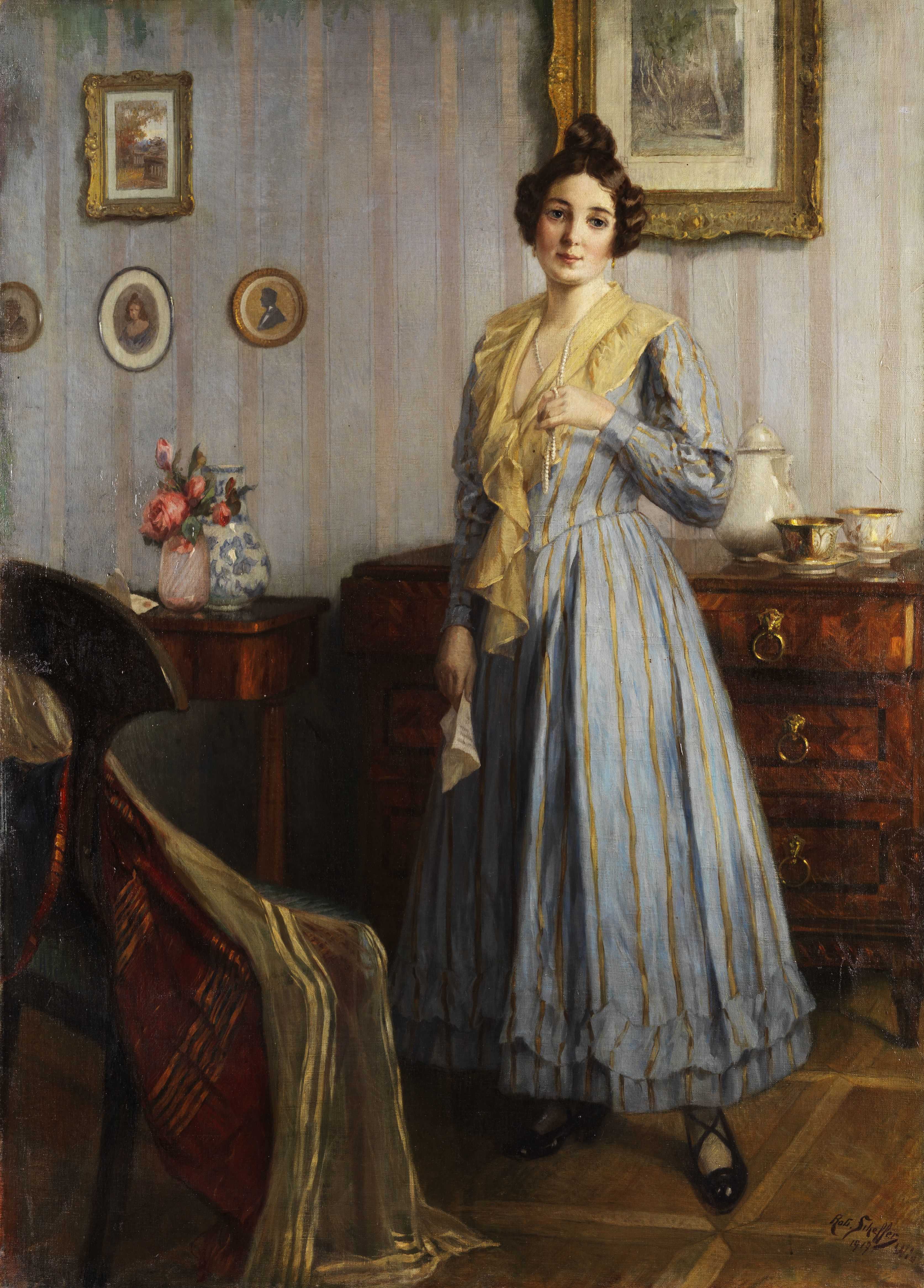 Junge Dame im Biedermeier-Interieur